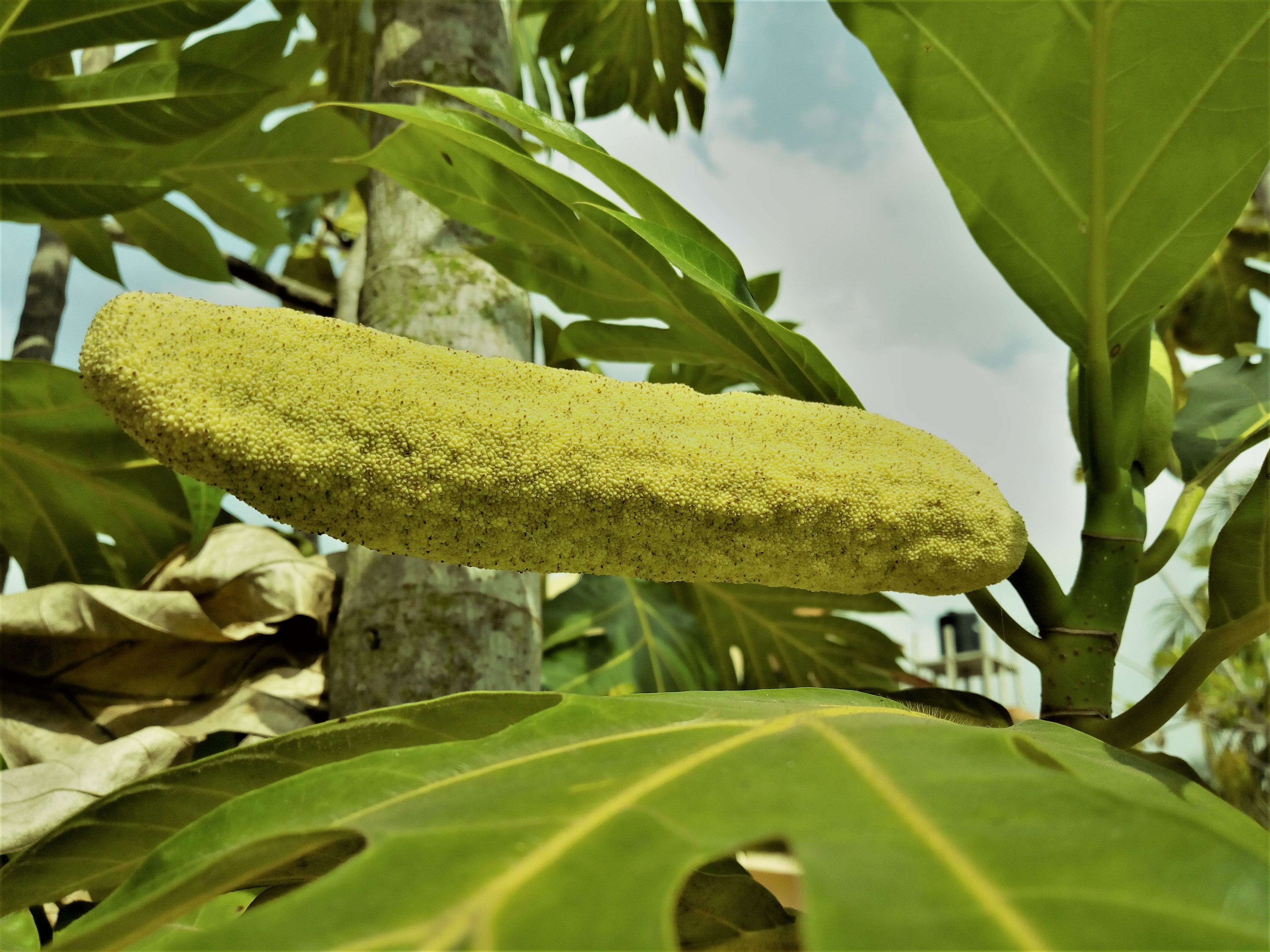 Une fleur entre les feuillages de l'arbre à pain (ou arbre de bèlèfoutou en langue locale au Bénin)